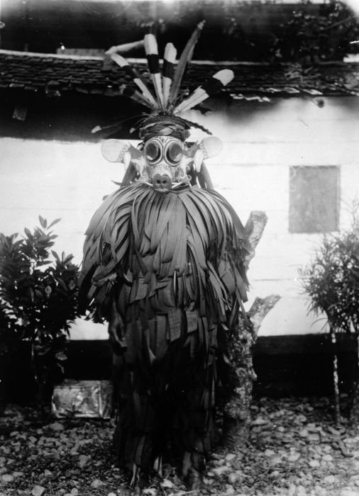 Foto. Een deelnemer aan een maskerdans in Laham ter gelegenheid van de aankomst van pater Groen